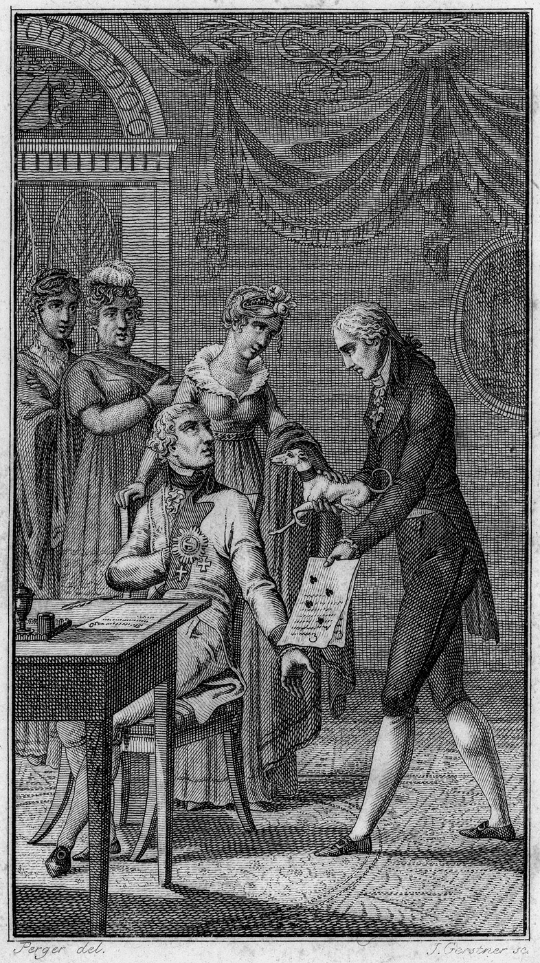 Illustration zu einem Werk von Maximilian Klinger Aus: Sämmtliche philosophische Romane Leipzig u. a. 1810.